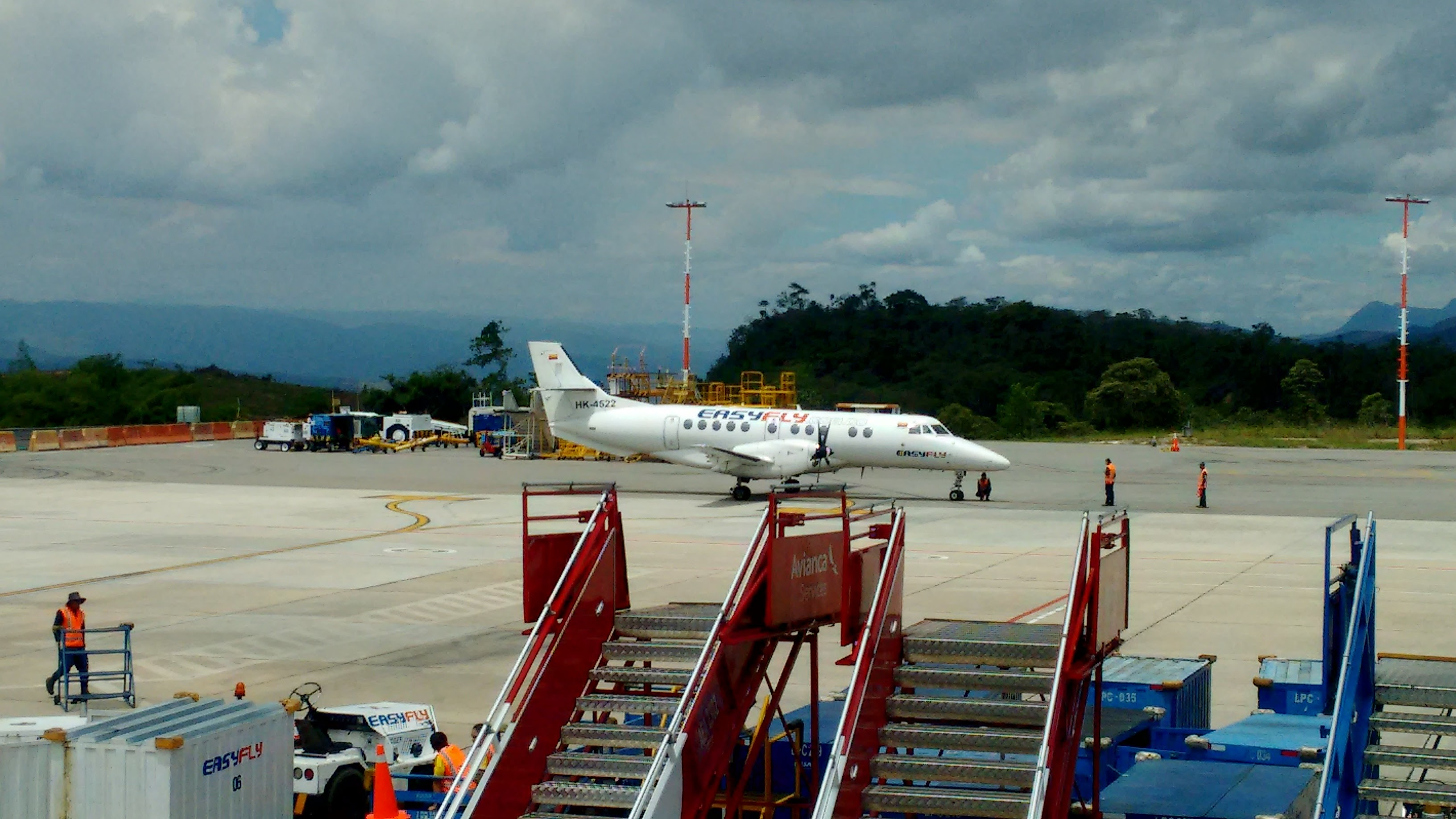 BAe Jetstream 41 de EasyFly Colombia en Bucaramanga